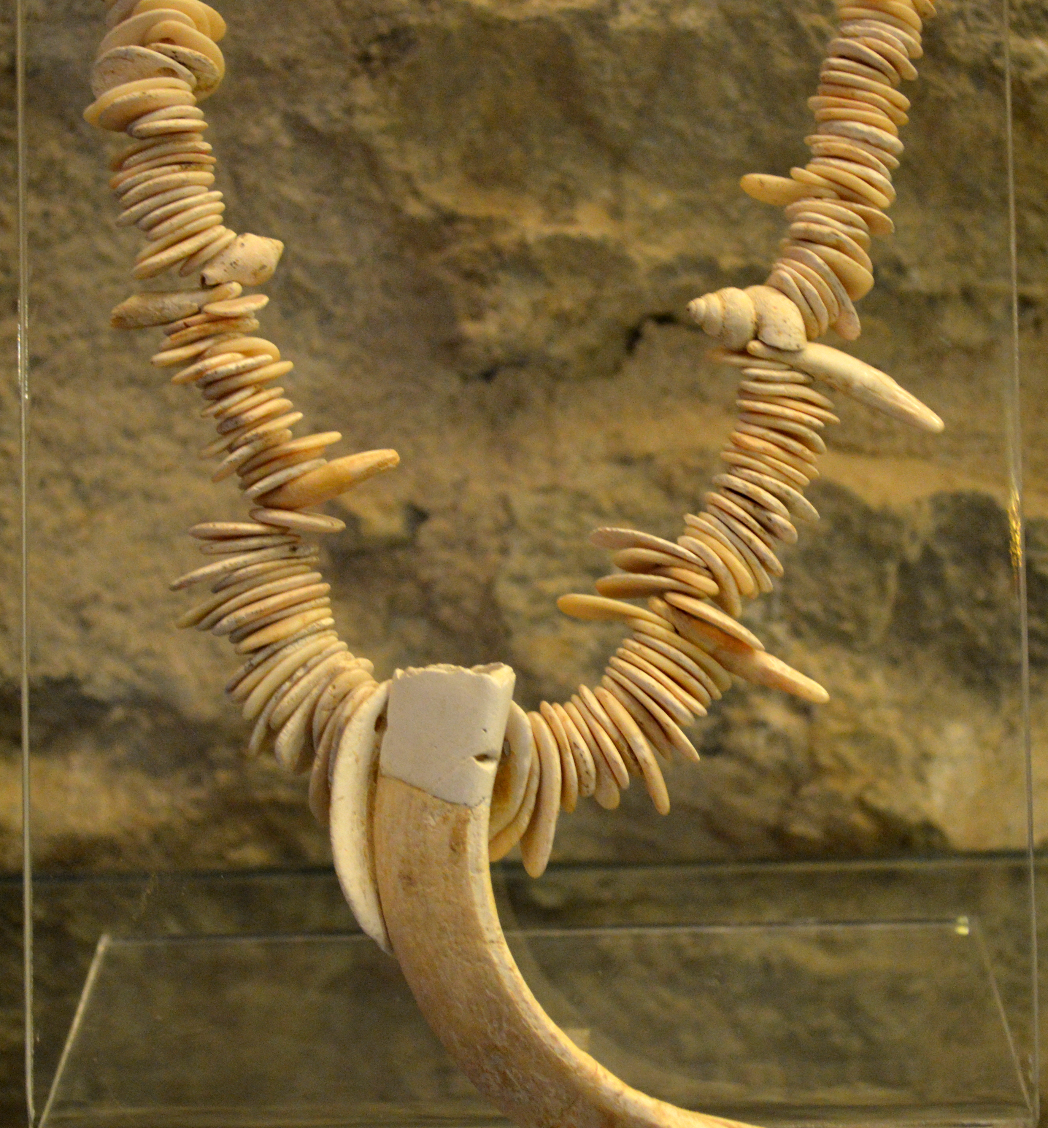 Museo archeologico "Villa Abbas" - MIBAC This is a photo of a monument which is part of cultural heritage of Italy.